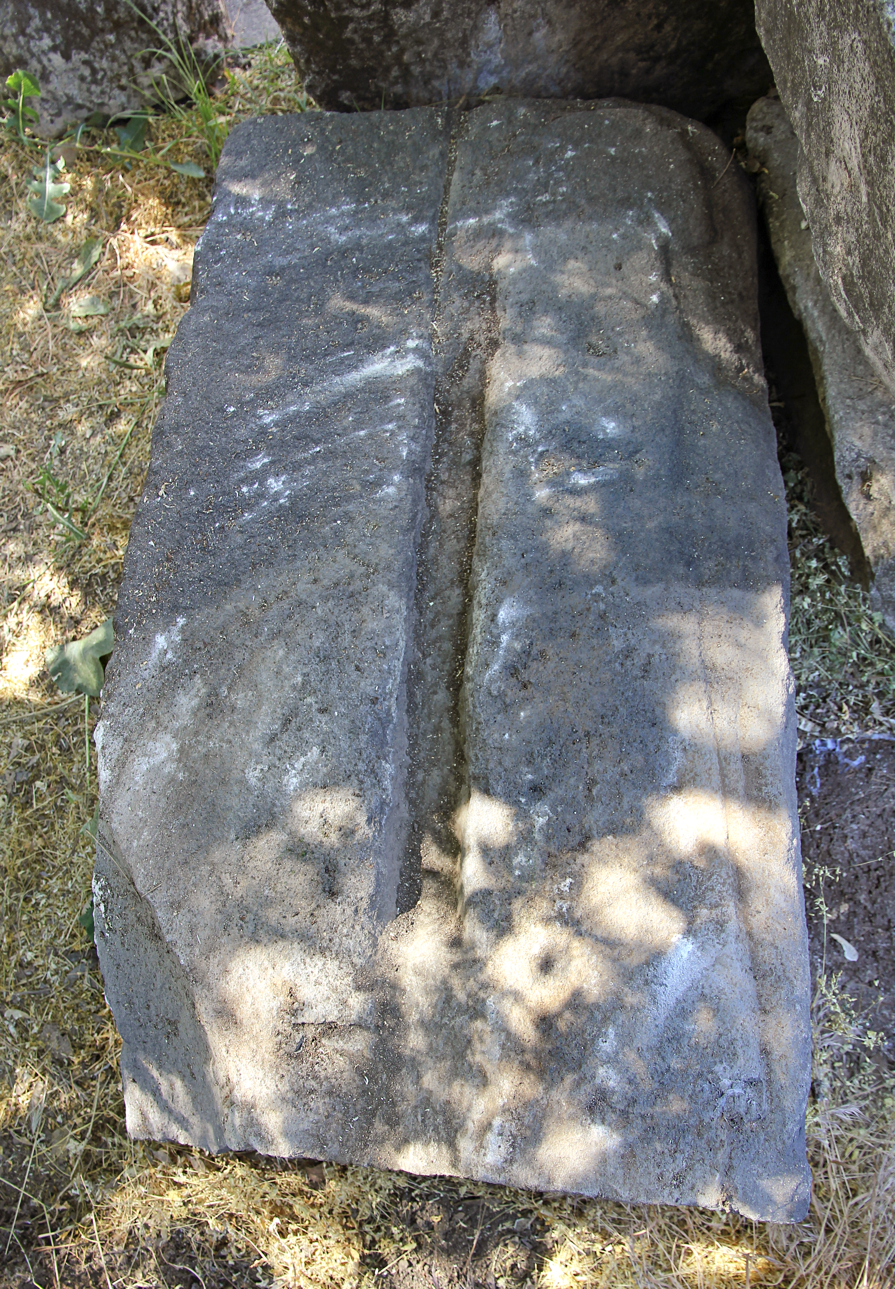 Späthethitische Stele Samsat 1 im Archäologischen Museum Adıyaman